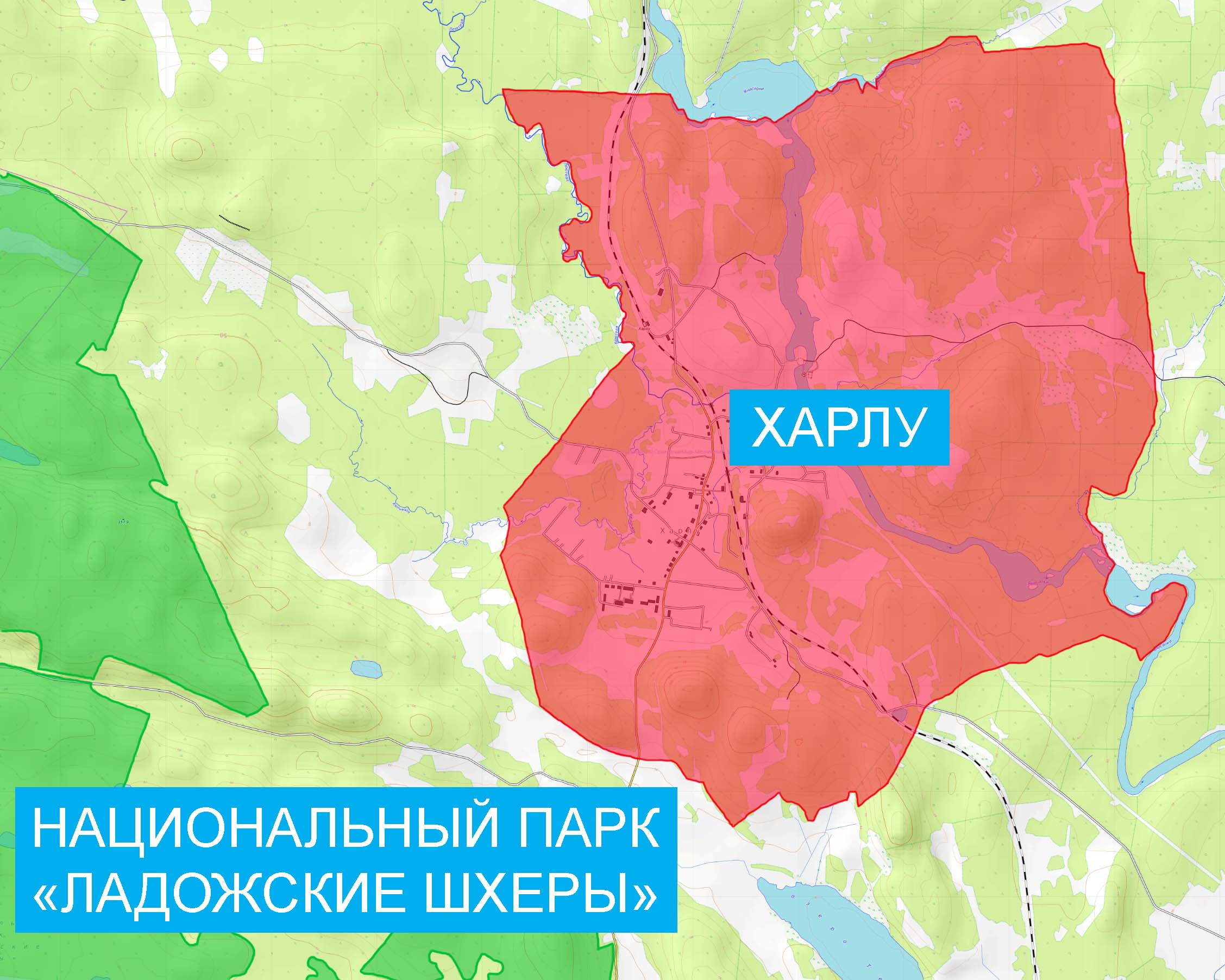 Национальный парк «Ладожские шхеры» в километре от Харлу.